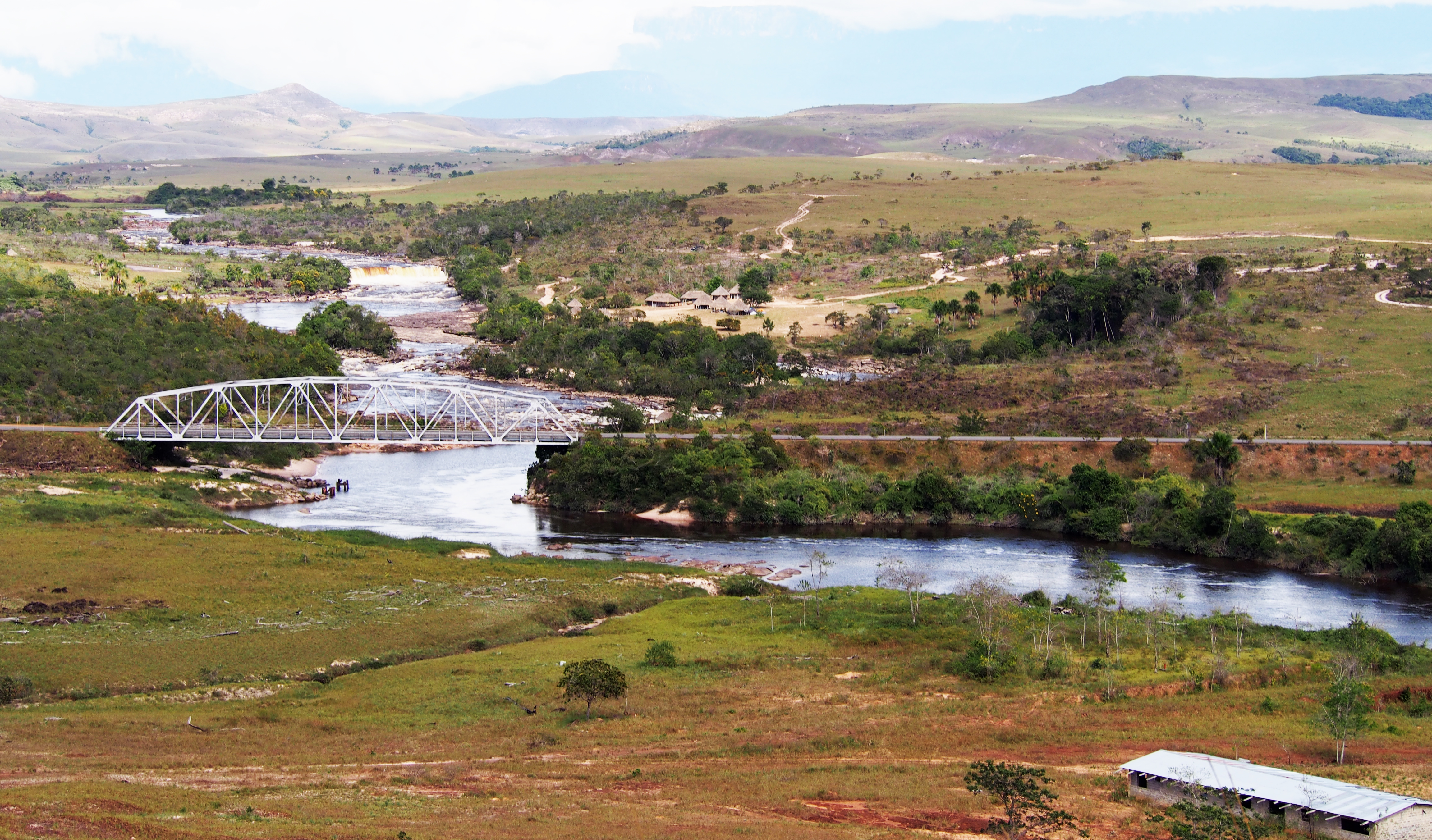 Los caminos del río Yuruaní en la Gran Sabana